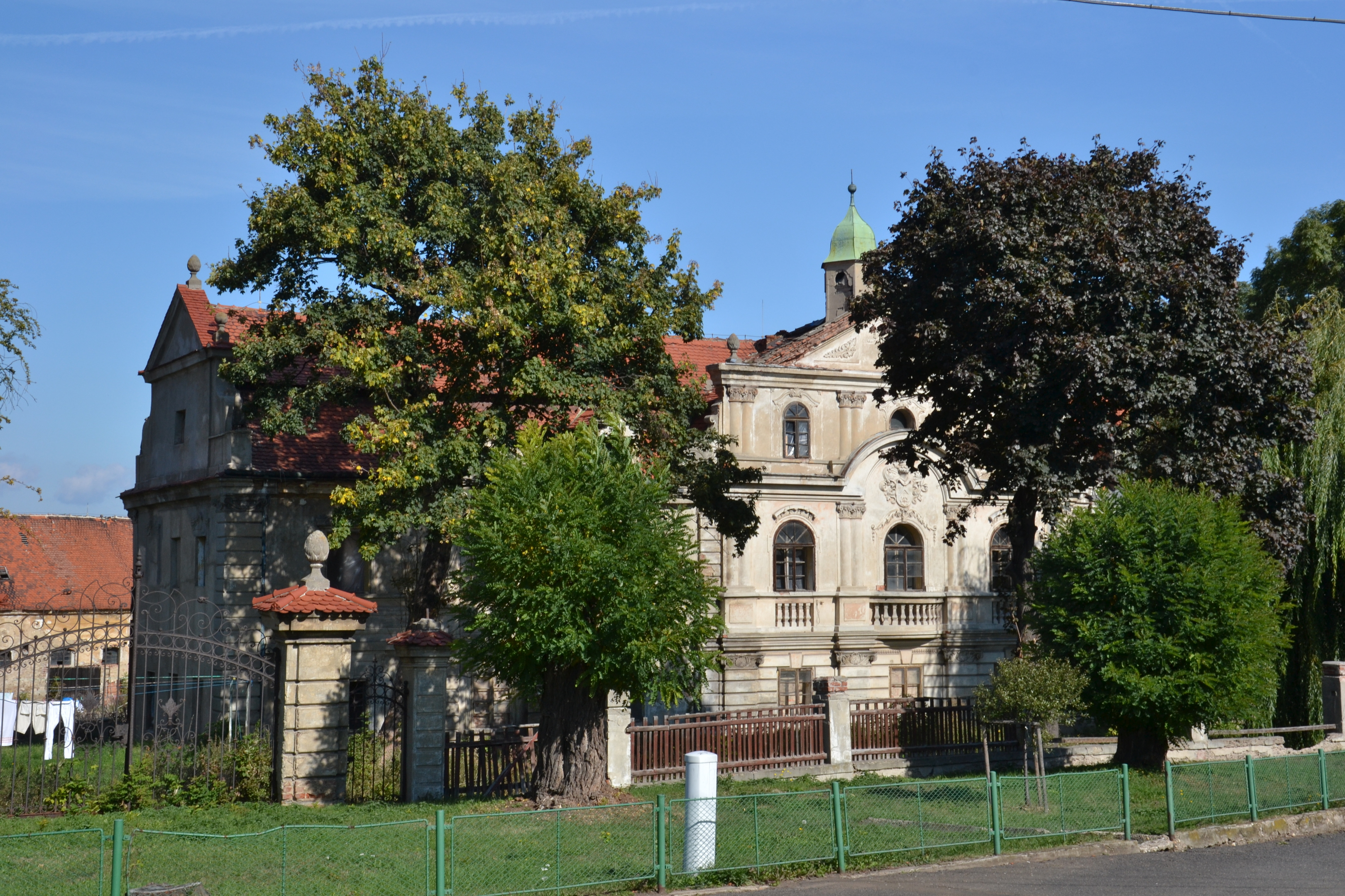 Zámek Poláky, Poláky 26